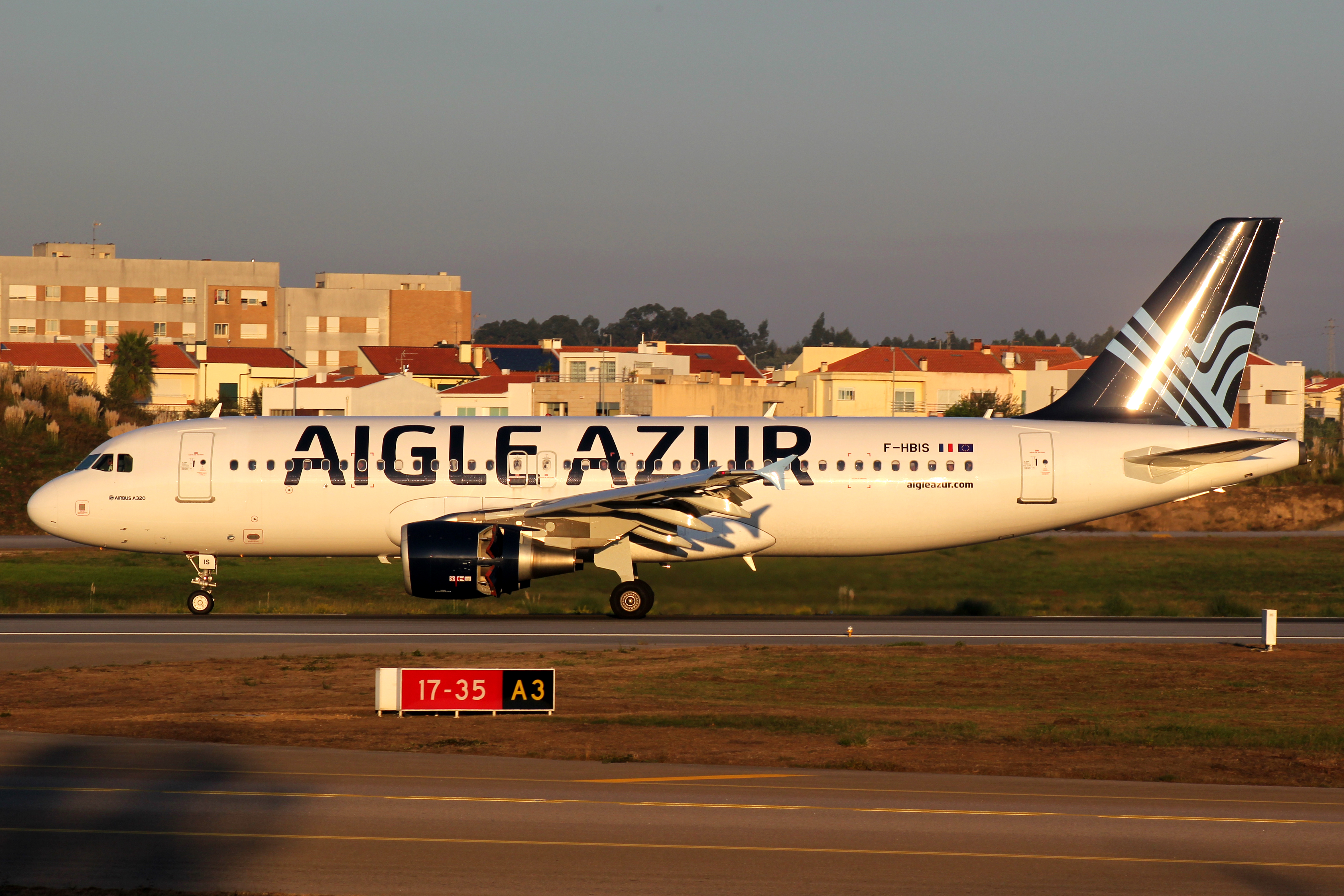 Airbus A320 de Aigle Azur no aeroporto do Porto.